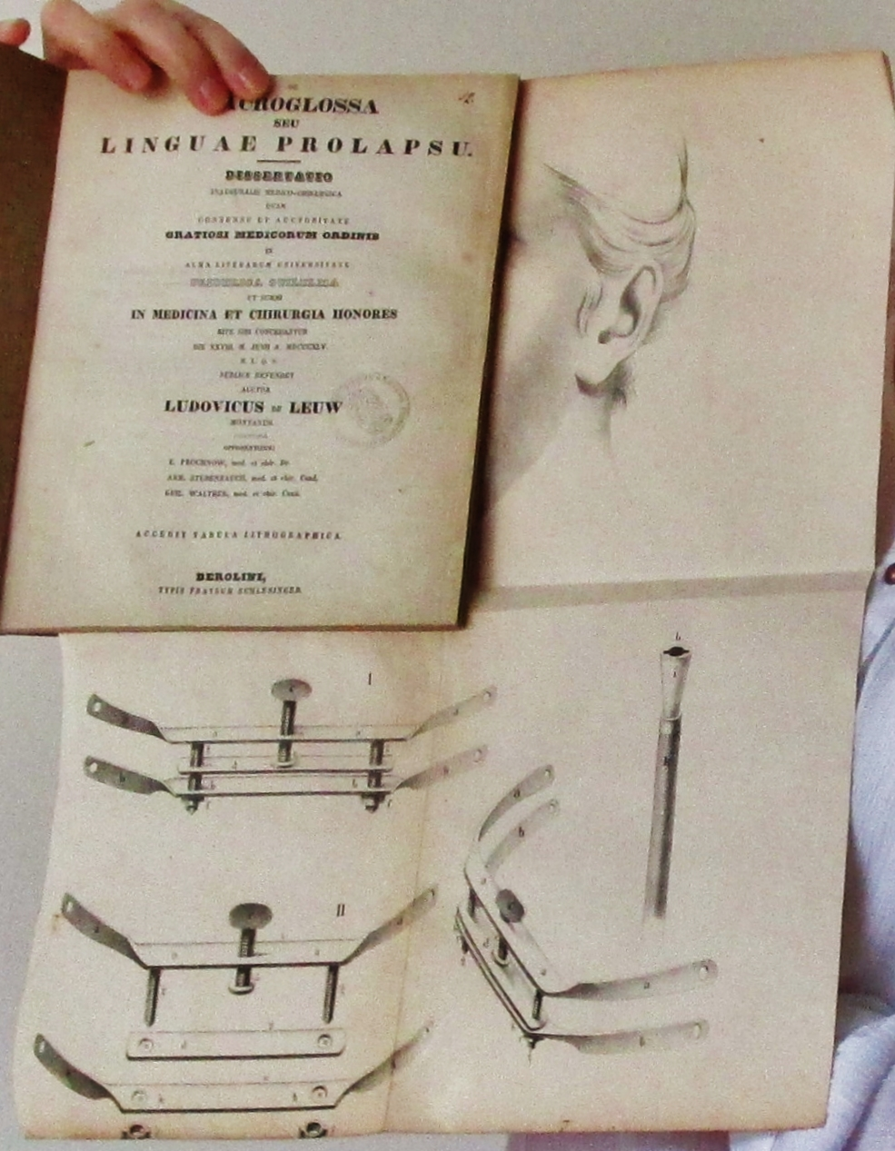 Medizinische Dissertation von 1845 an der Friedrich-Wilhelm-Universität Berlin